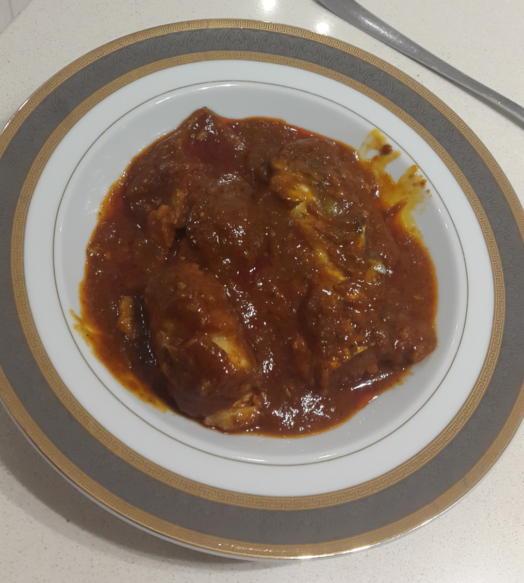 צלחת חריימה של סבתא שלי (גמילה זנזורי) שהכינה לליל הסדר 2017